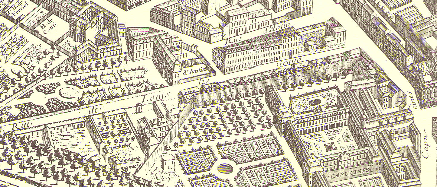 Paris, rue Louis Le Grand